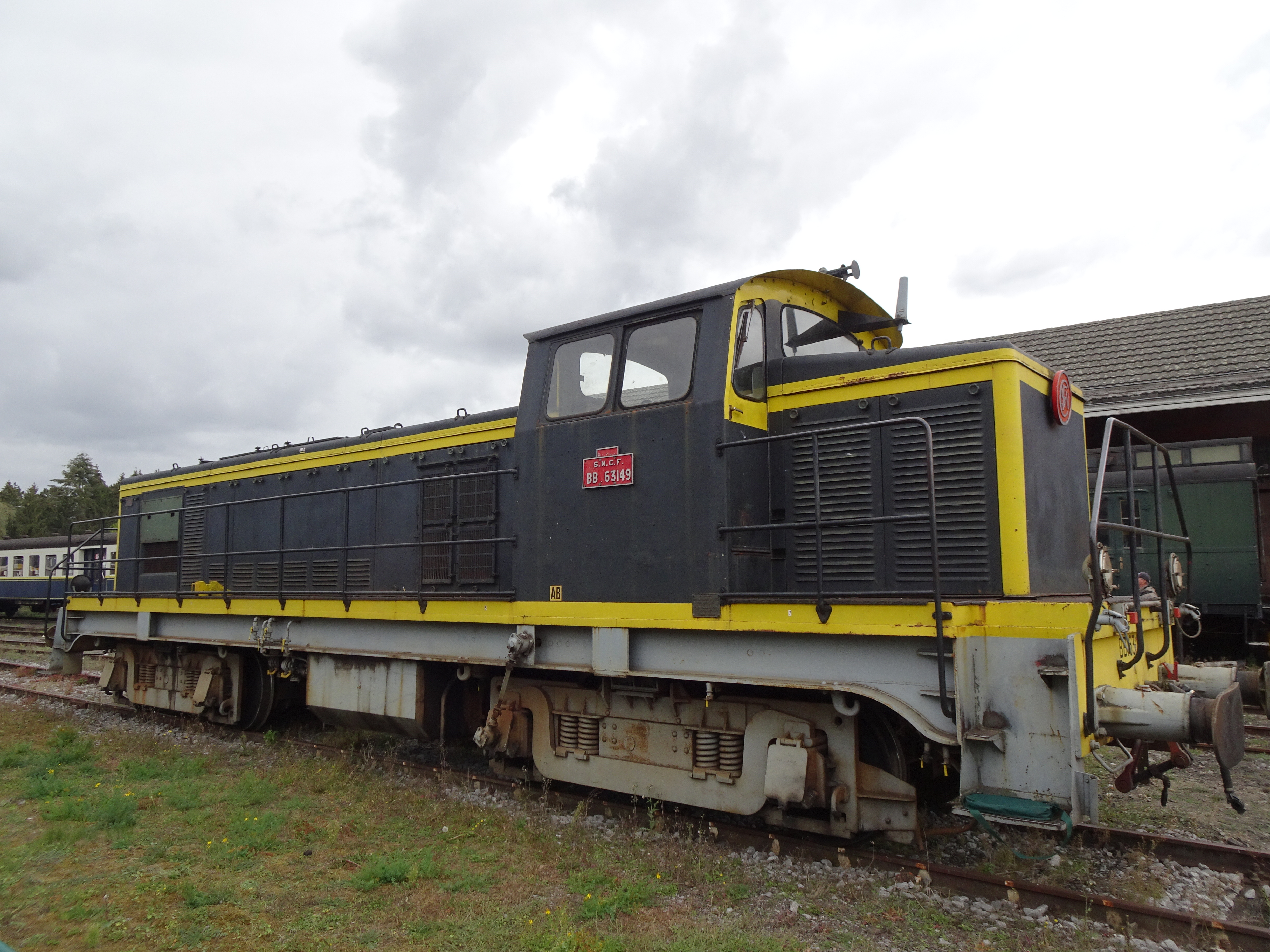 BB 63149 au festival vapeur du CFV3V